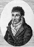 Jean-Baptiste Charles Bouvet de Lozier